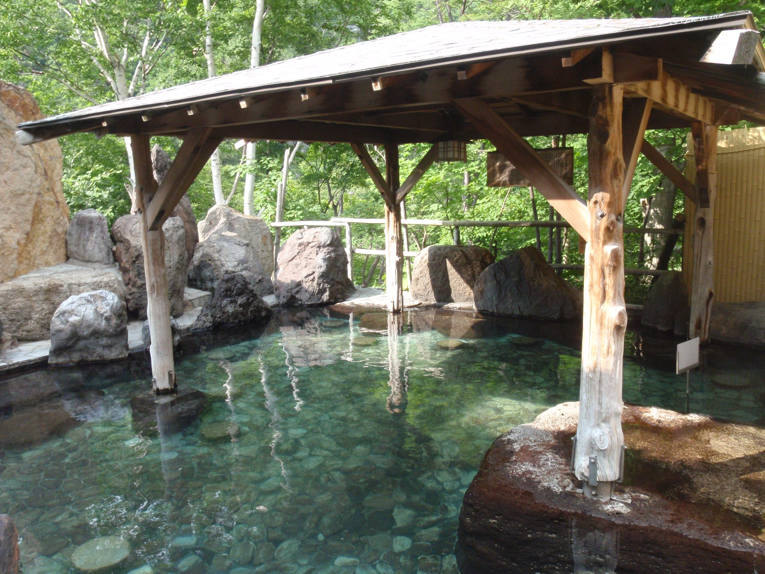 層雲峡温泉、層雲閣グランドホテル、露天風呂